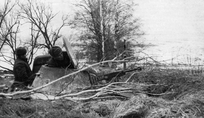 Экипаж танка Т-40 в засаде. Западный фронт, предположительно 24-я танковая бригада, ноябрь 1941. Машина перекрашена в защитный белый цвет.